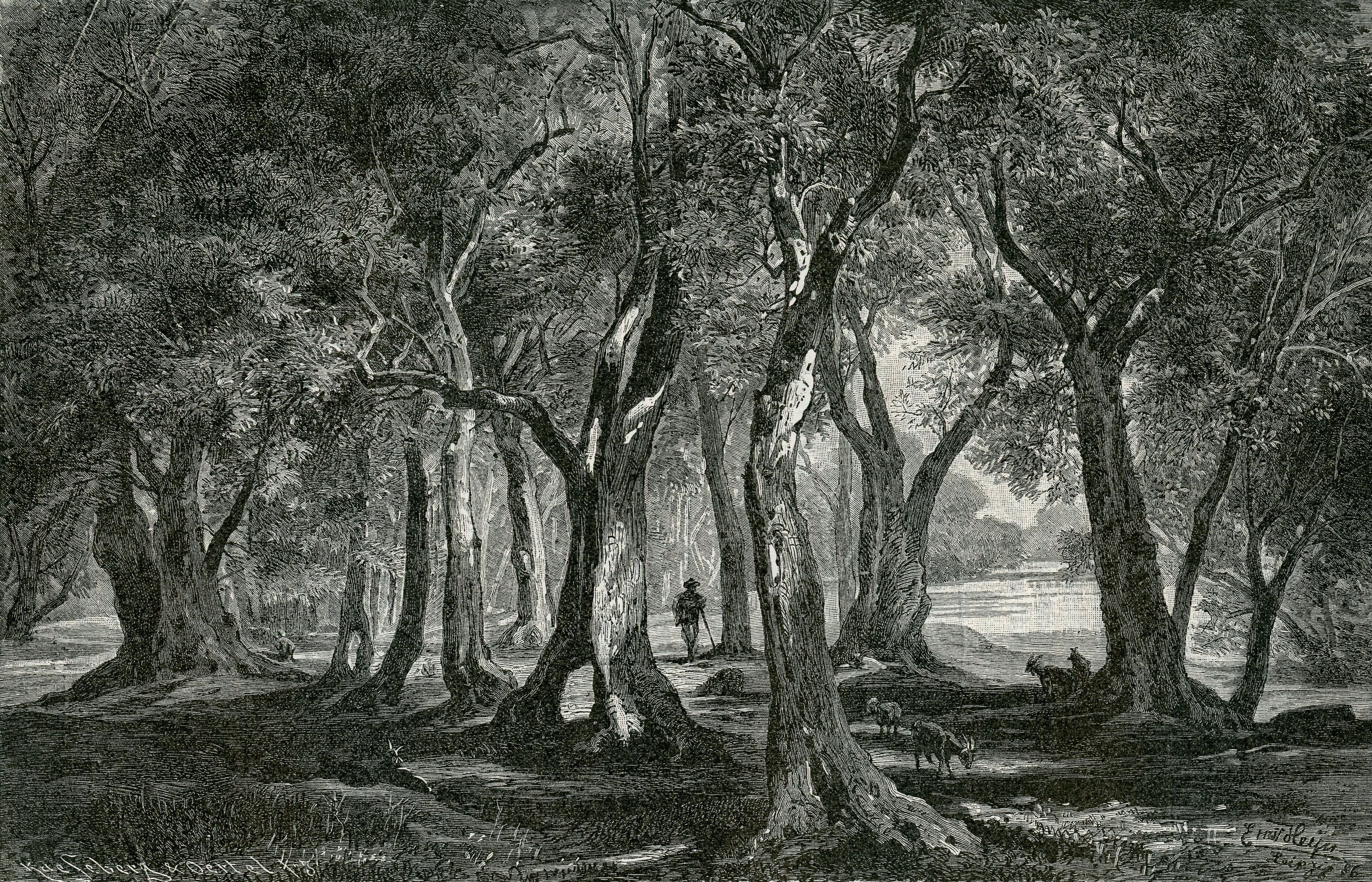 Boschetto di olivi sulle rive del lago di Garda a Torbole (xilografia).